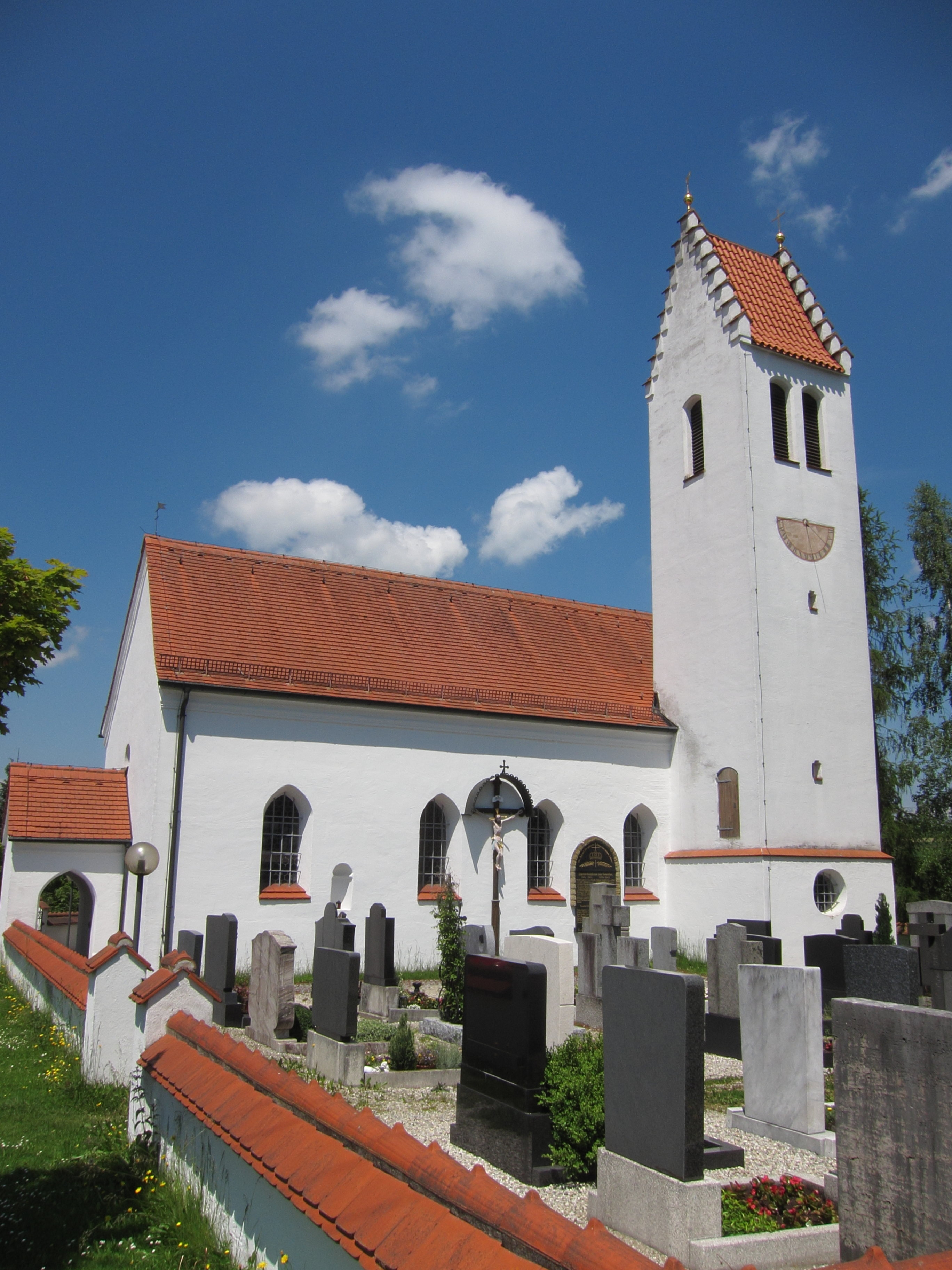 Weiher; katholische Filialkirche St. Laurentius, auf einer Anhöhe stehender Saalbau mit polygonalem Chorabschluss, Chorflankenturm und angefügter Sakristei, Anfang 16. Jahrhundert, um 1900 Langhausverlängerung.